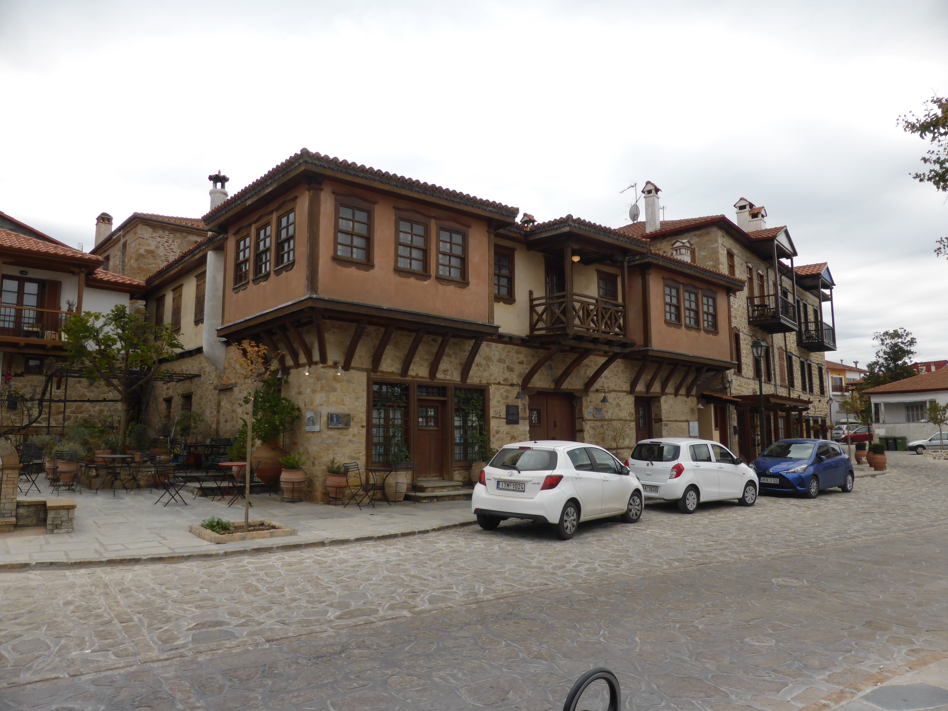 Hotel in traditionellen Baustil im griechischen Ort Arnea, Chalkidiki.